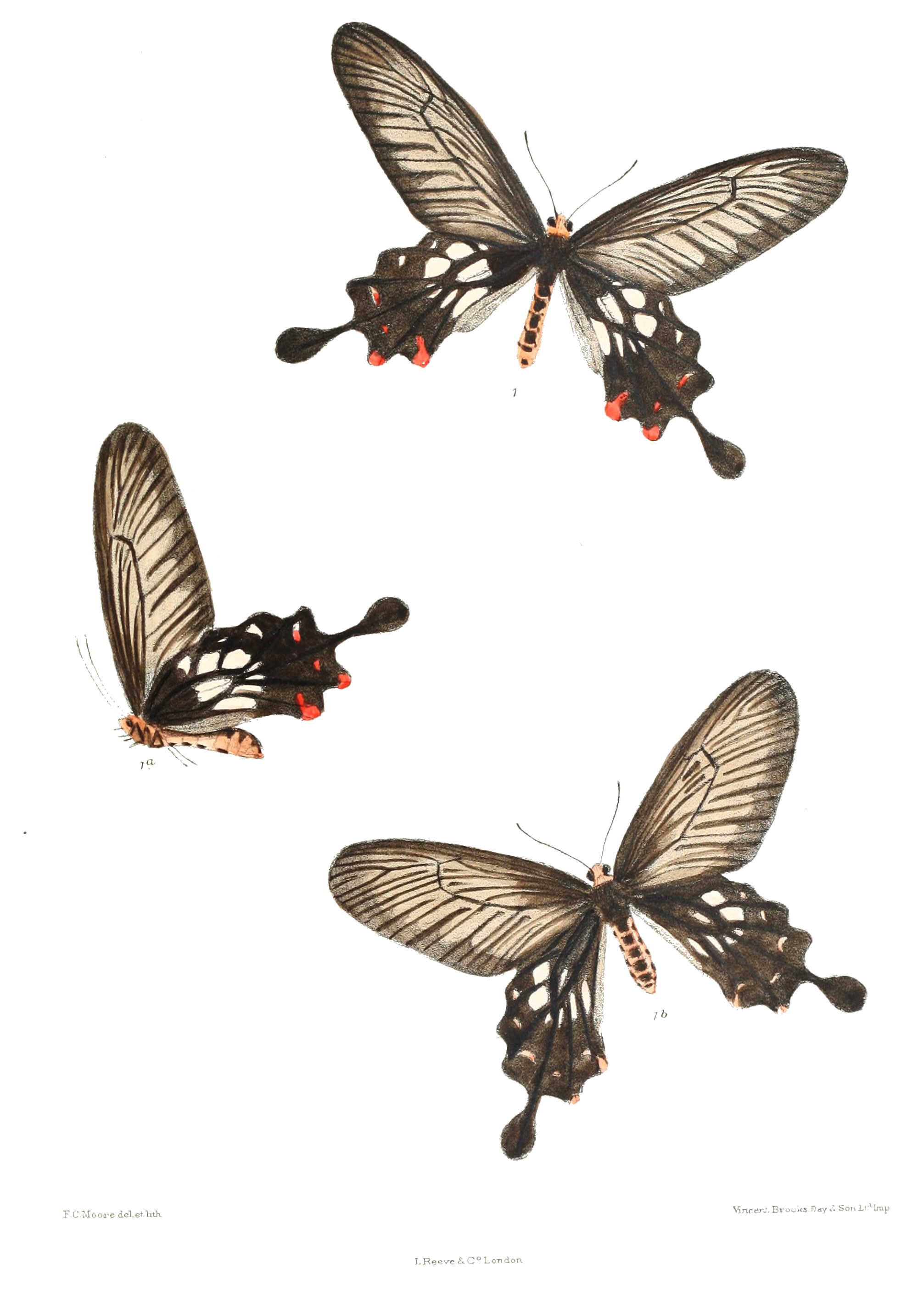 Losaria cacharensis = Atrophaneura coon cacharensis